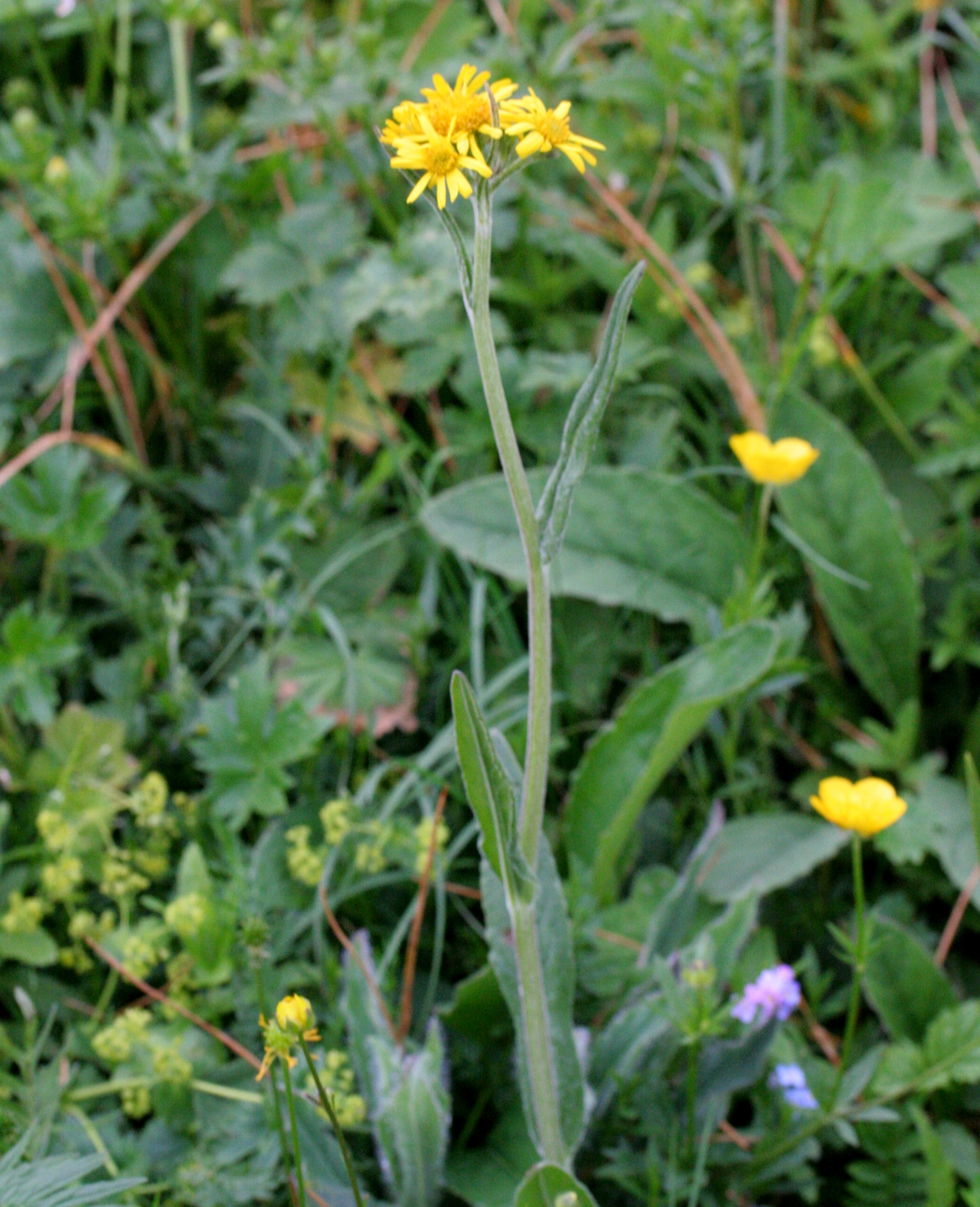 Senecione a foglie lunghe - Località: Giardino Botanico Alpino "Giangio Lorenzoni", Pian Cansiglio, Tambre d'Alpago (BL), 1000 m s.l.m.